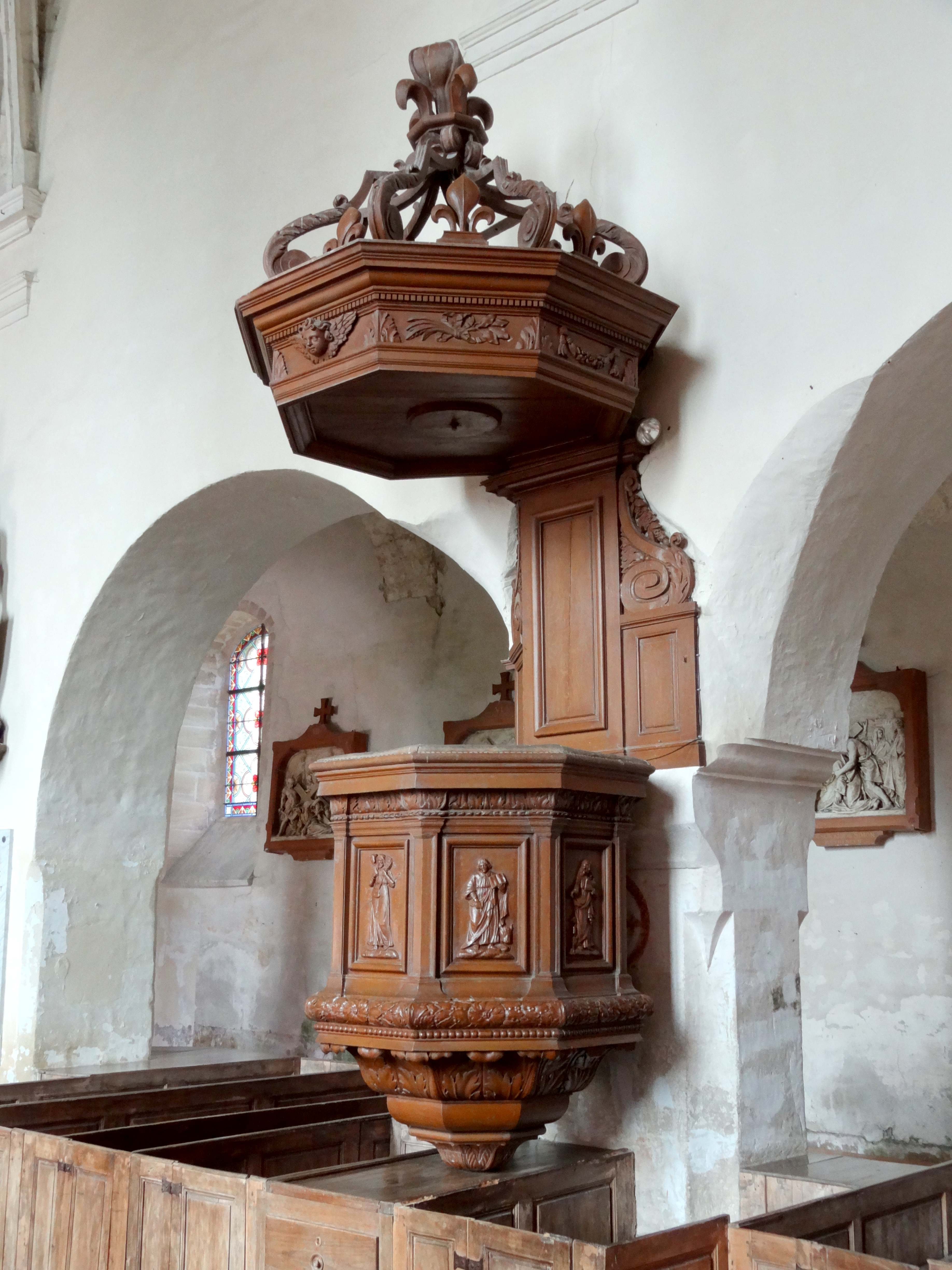 Mobilier de l'église - voir titre.